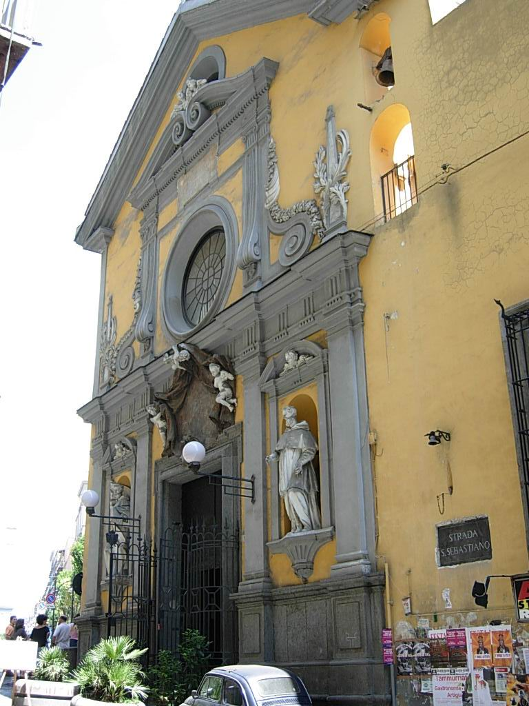 Chiesa di Santa Maria della Mercede e Sant'Alfonso Maria de' Liguori in Napoli Foto personale concessa in PD